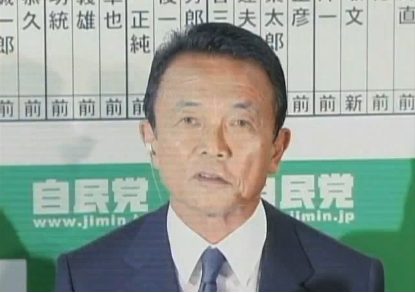 Aso Taro